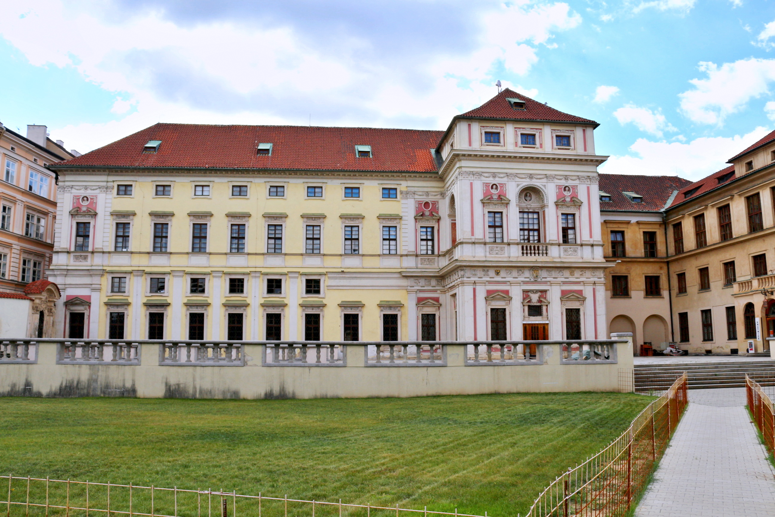 Palác Michnů z Vacínova